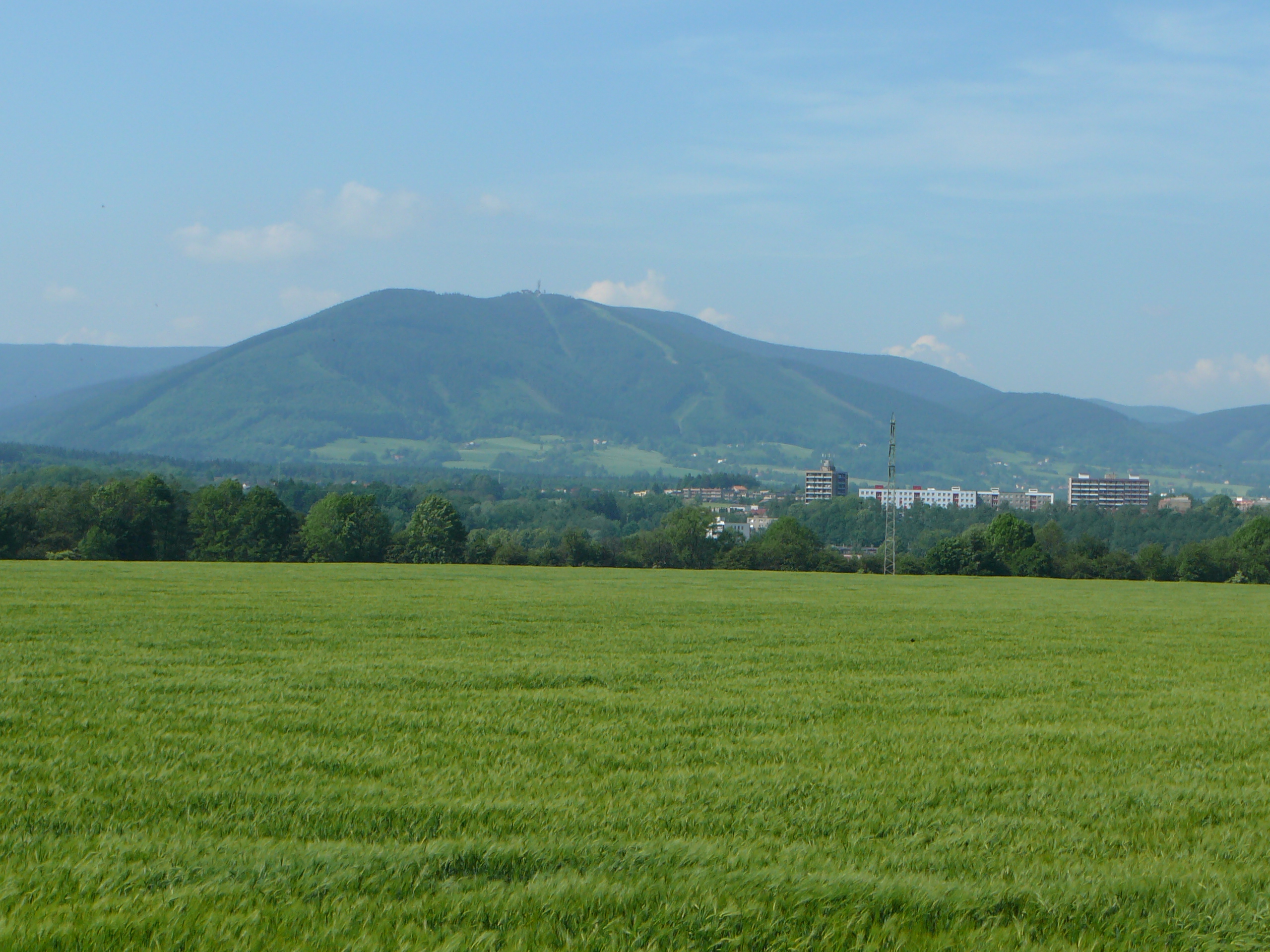 Javorový vrch s vysílačem